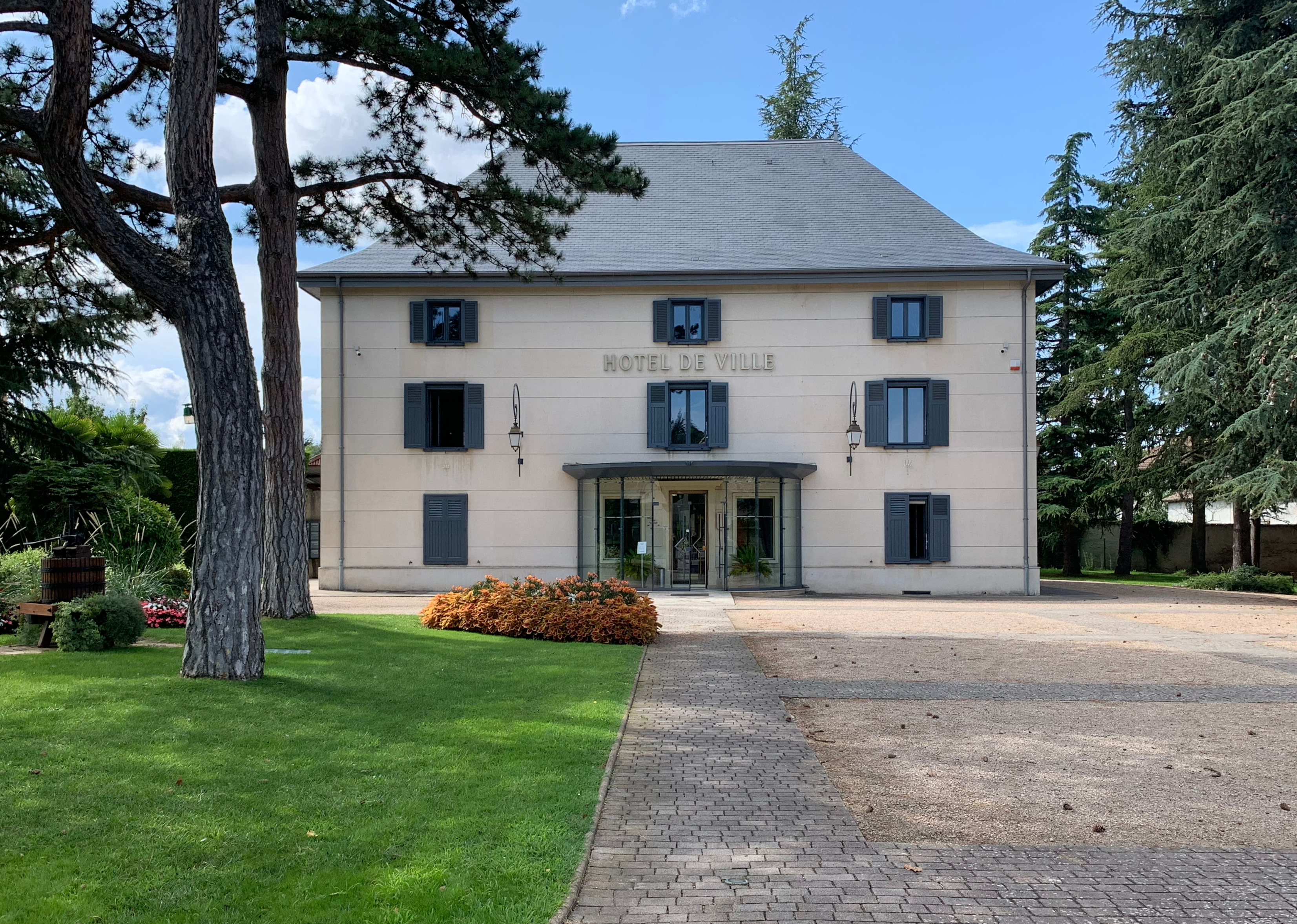 Mairie de Villette-d'Anthon (août 2019).